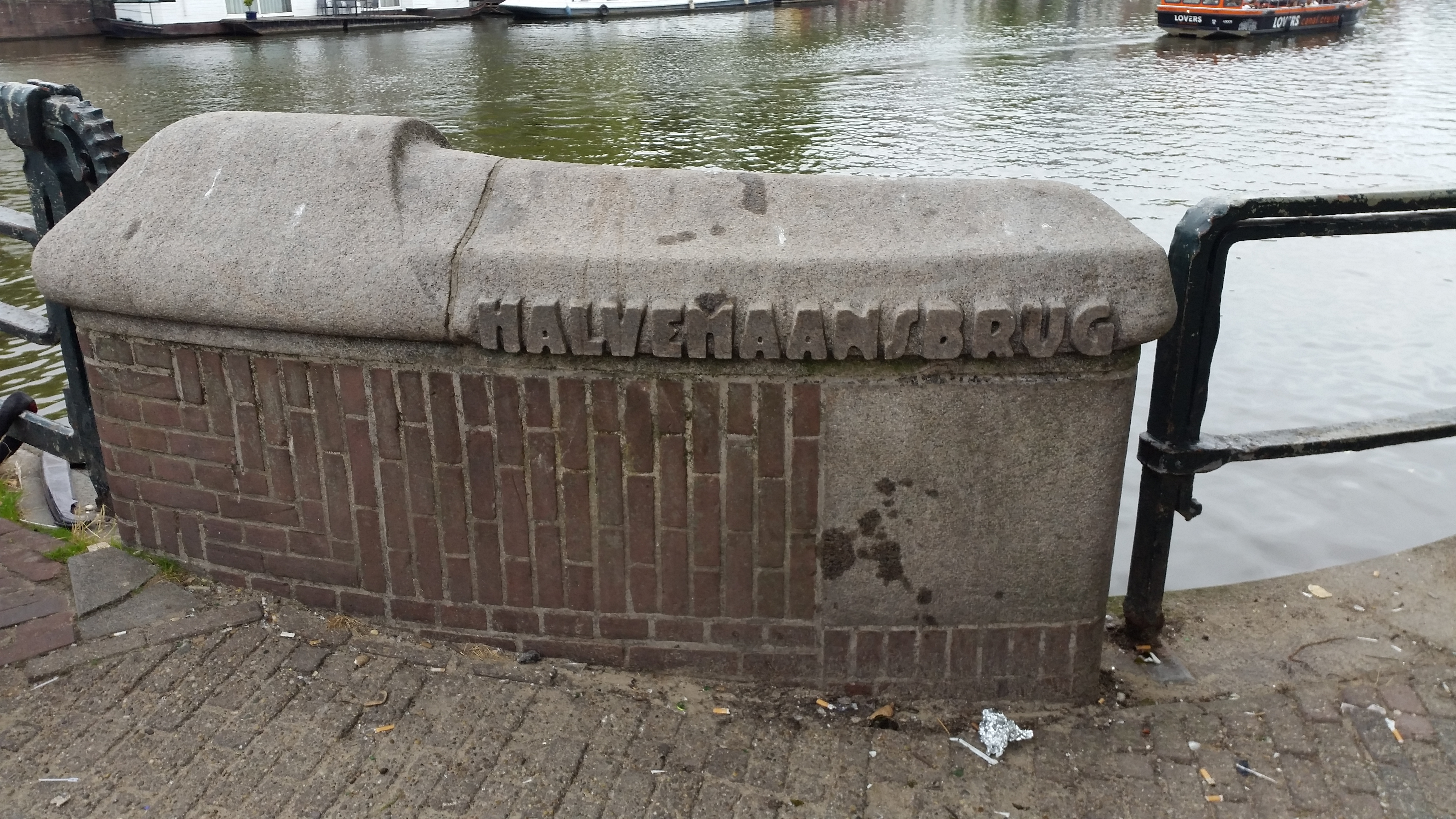 Brug 221, Halvemaansbrug, naambord in natuursteen